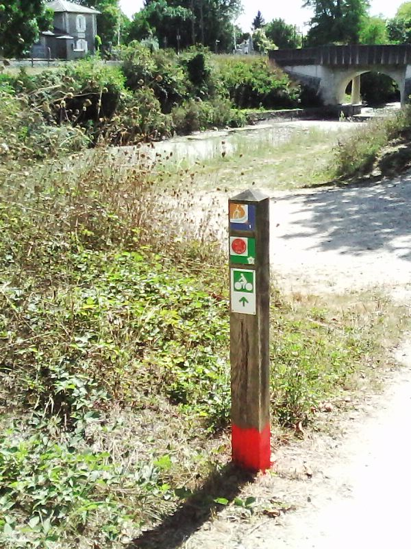 Balisage de la vélodyssée, près du canal de Marans à La Rochelle